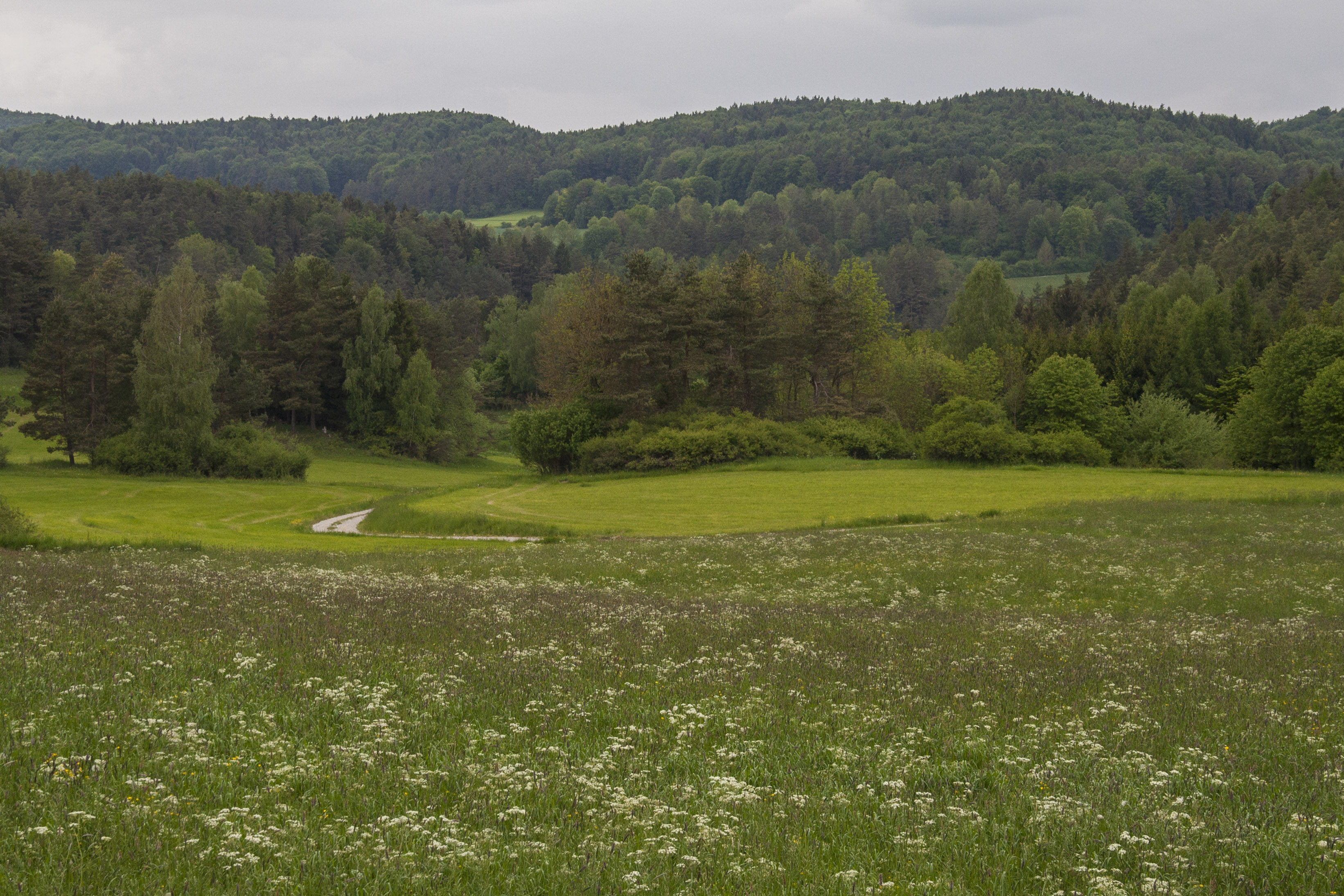 Alfeld, LSG „Südlicher Jura mit Moritzberg und Umgebung“